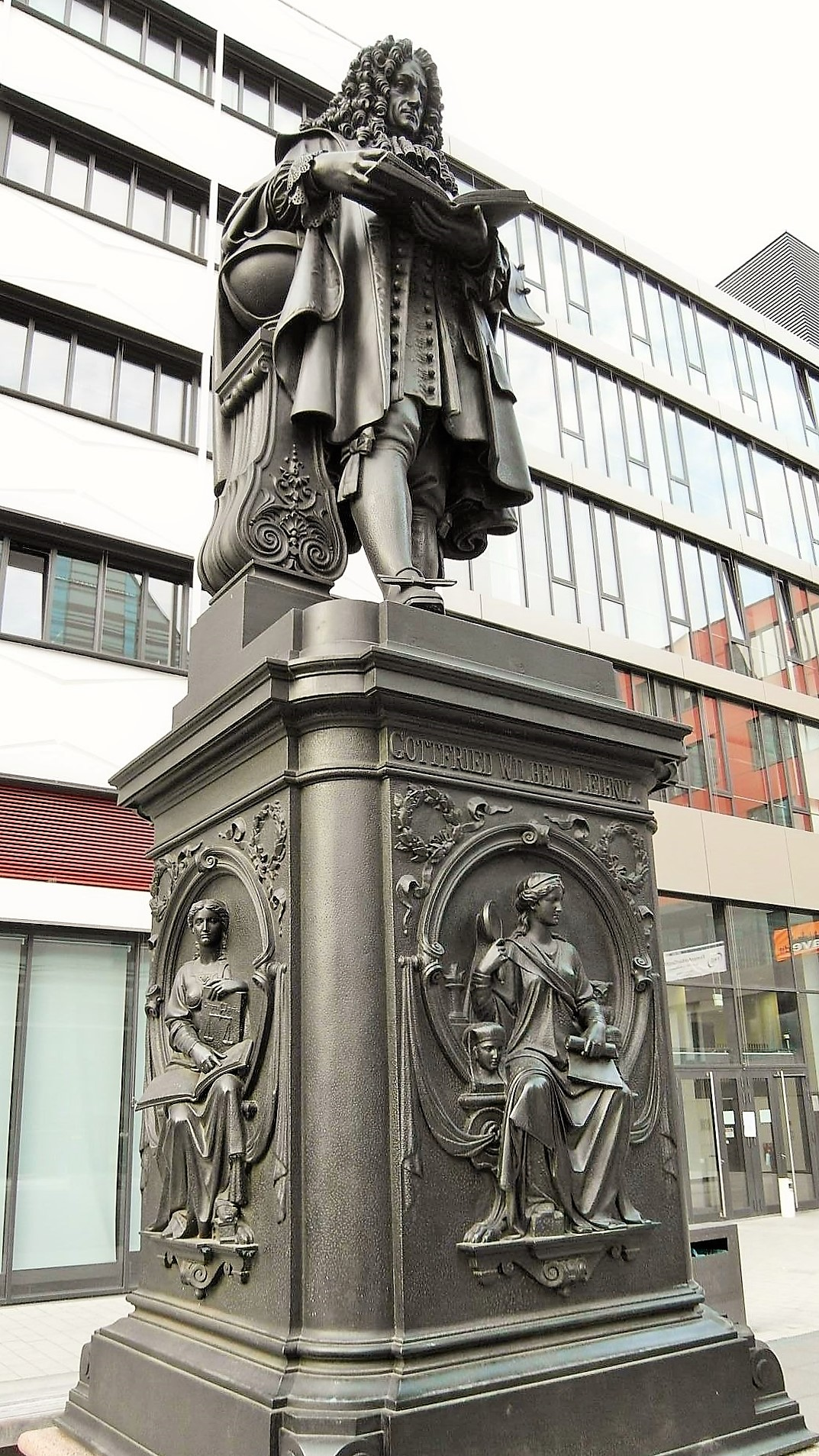 Leibniz-Denkmal in der Universität seiner Geburtsstadt Leipzig